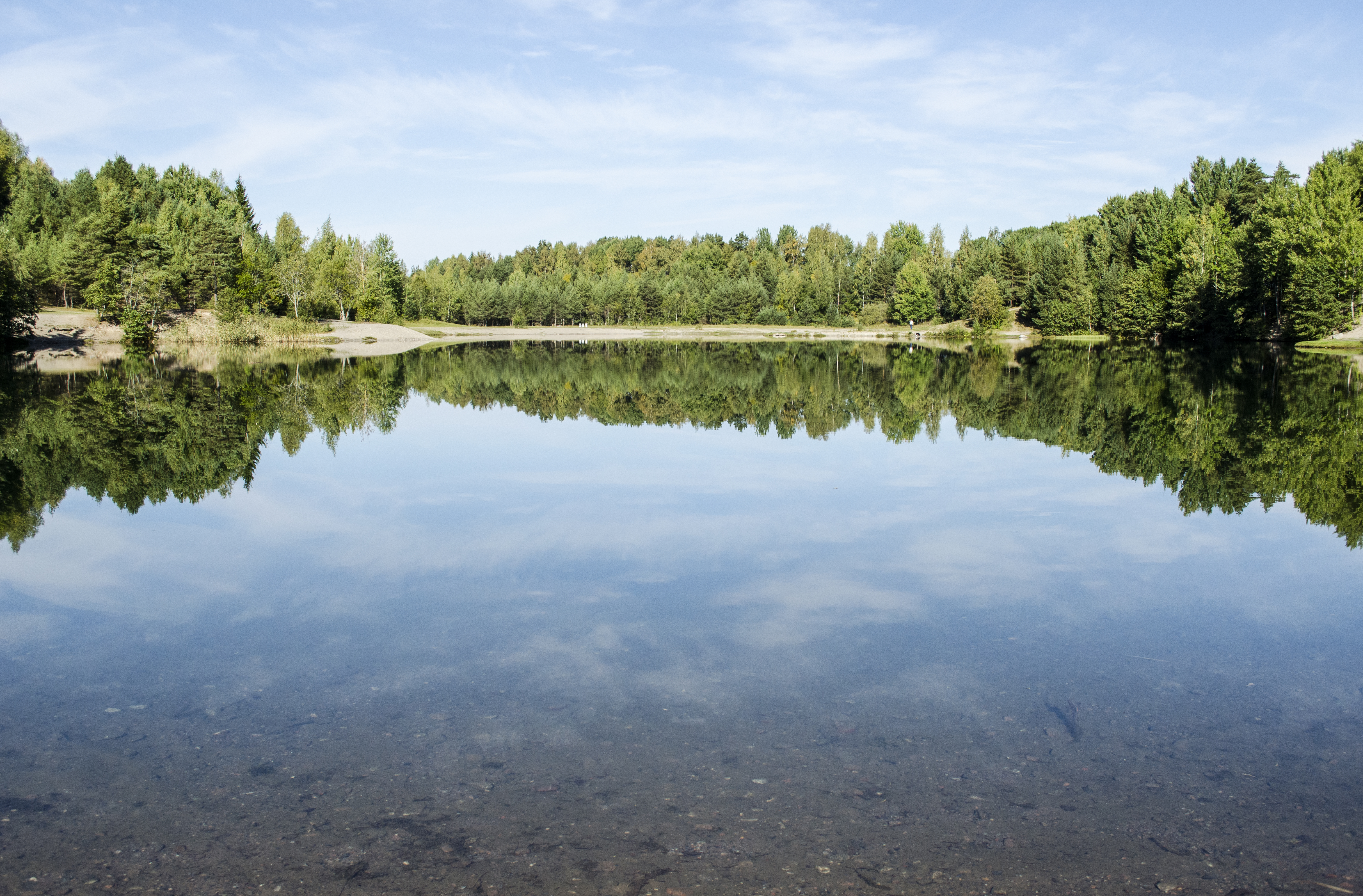 En gammal grustäkt i Västerås, nära Hökåsen, som har blivit en badsjö.